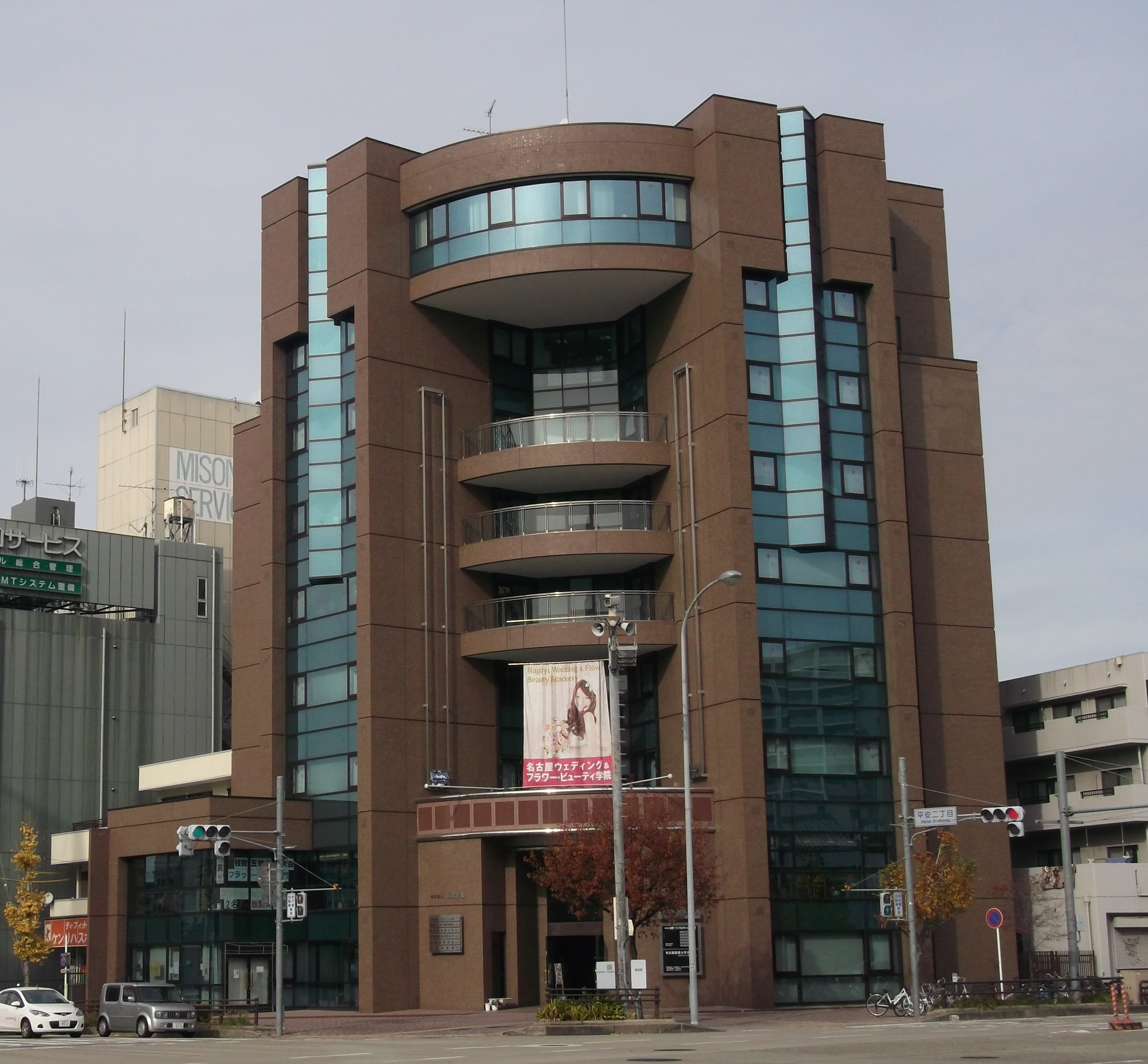 名古屋市北区平安にある名古屋ウェディング&フラワー・ビューティ学院校舎を南東角から写す